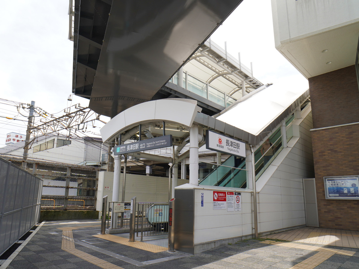 長津田駅北口（神奈川県横浜市緑区長津田4-1-1）